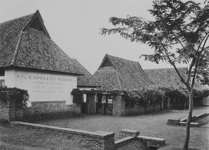 foto. De v/d Capellenschool, een Christelijke Europese lagere school